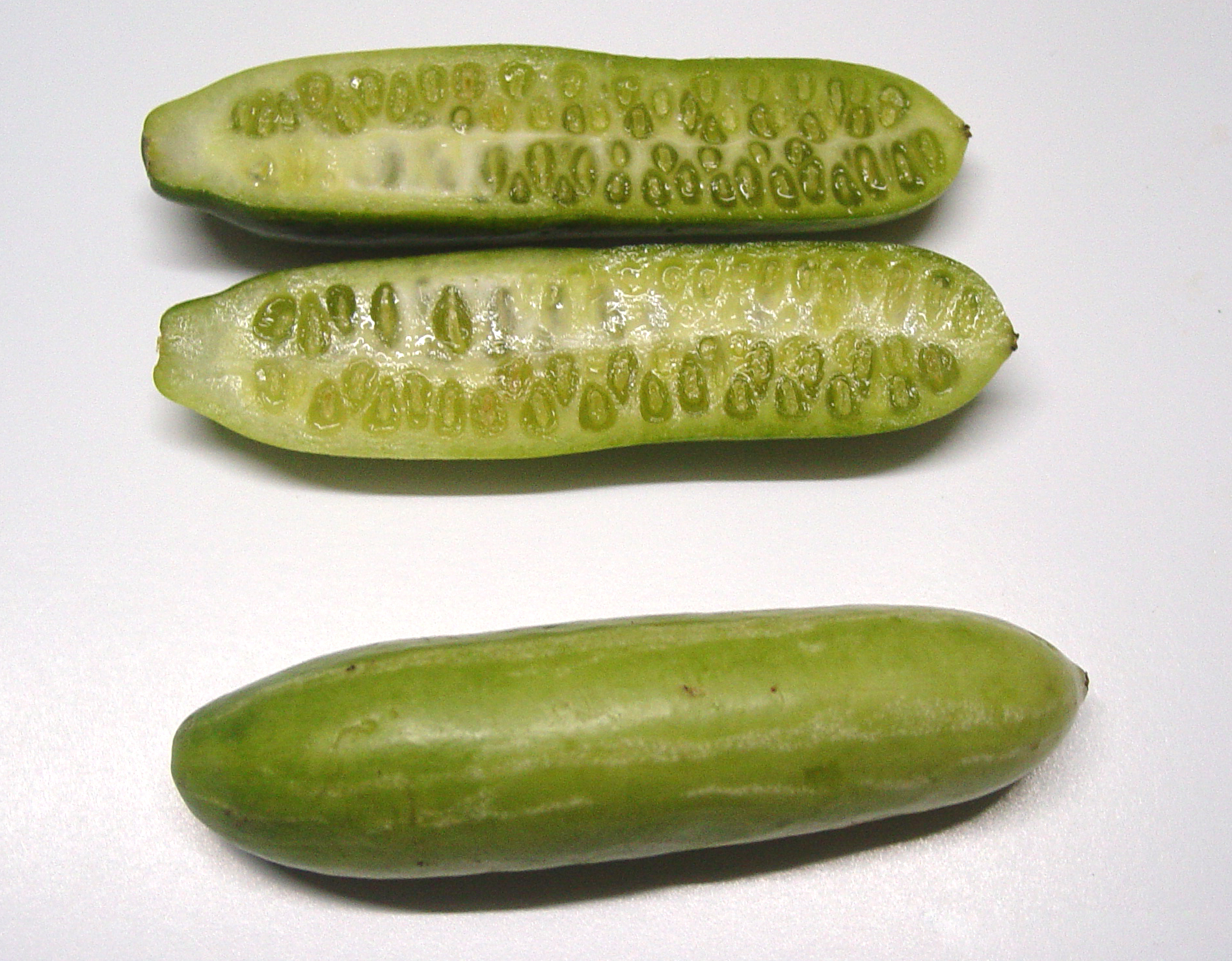 കോവക്ക